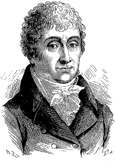 Camille Jordan 1771-1821, homme politique